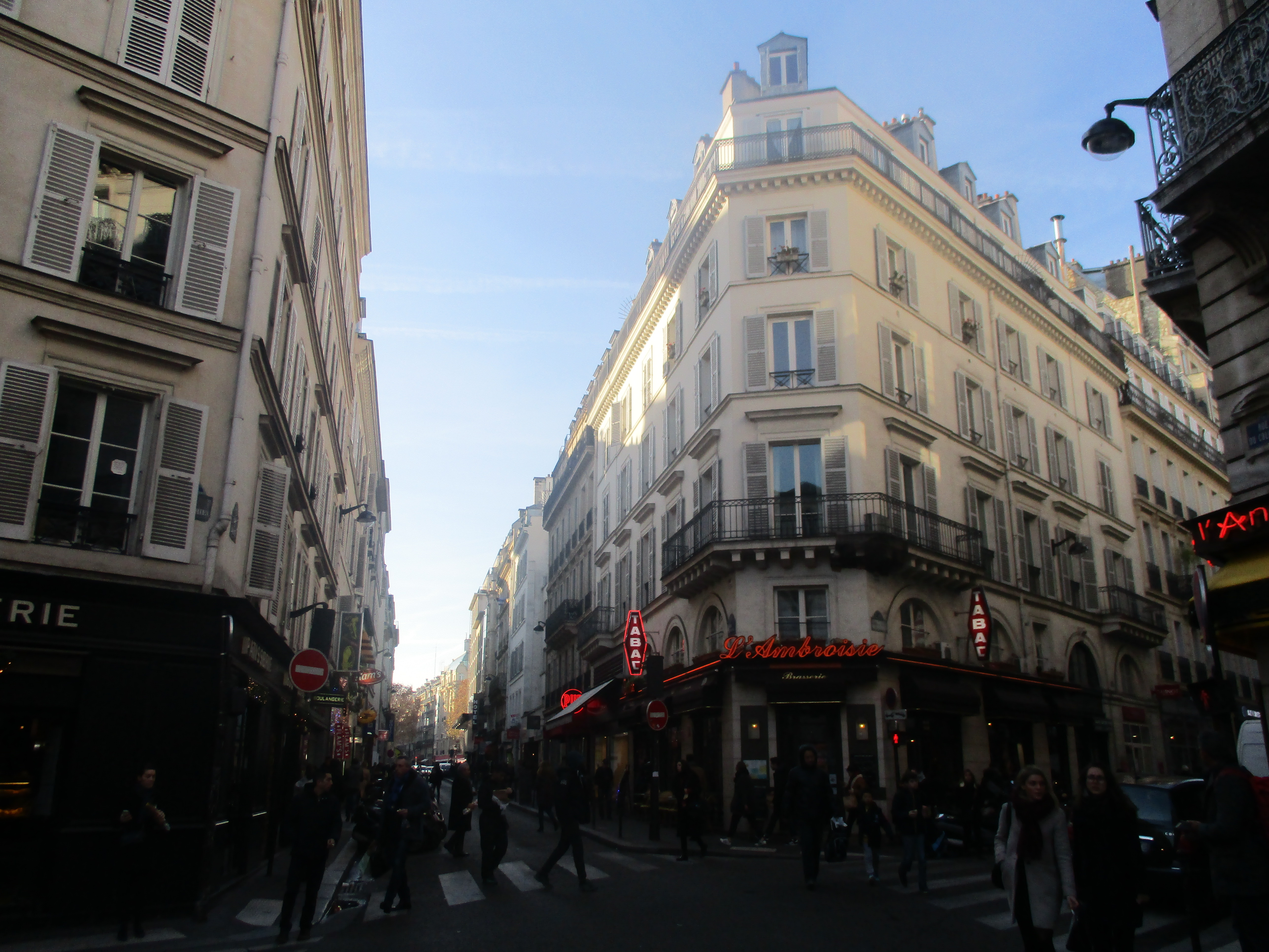 Angle de la rue du Colisée et de la rue de Ponthieu, Paris VIIIe.